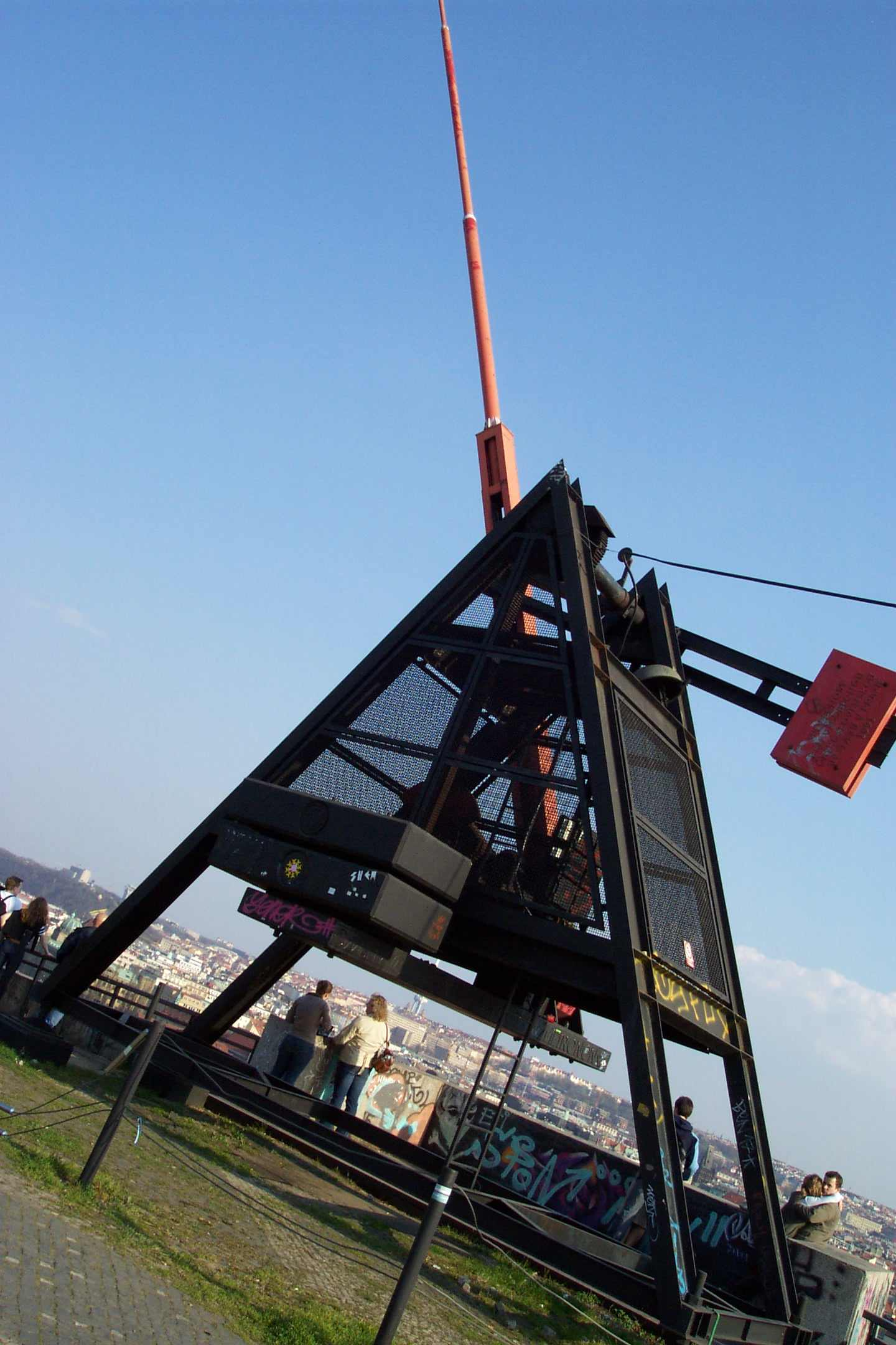 Metronome at Praha - Letná - Metronom v Praze na Letné